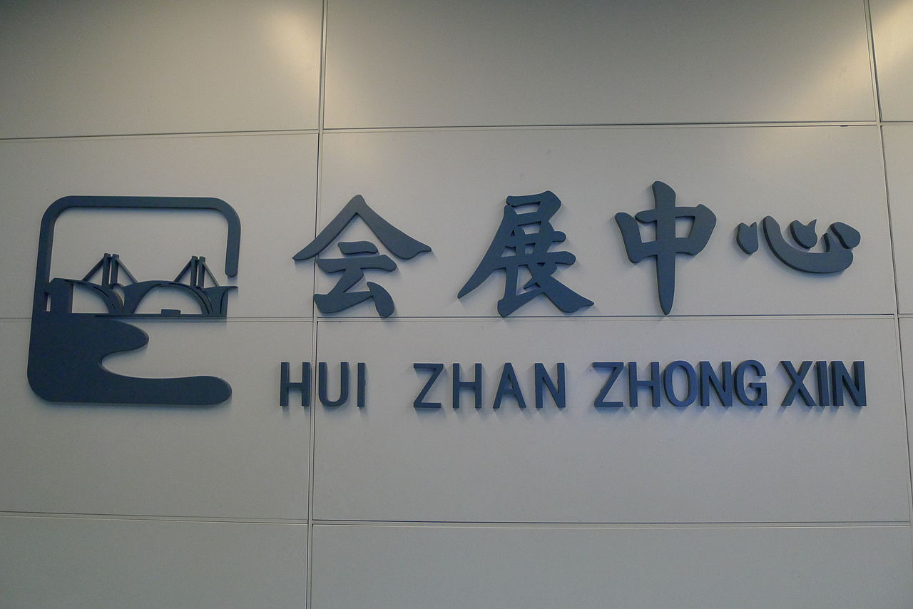 会展中心车站